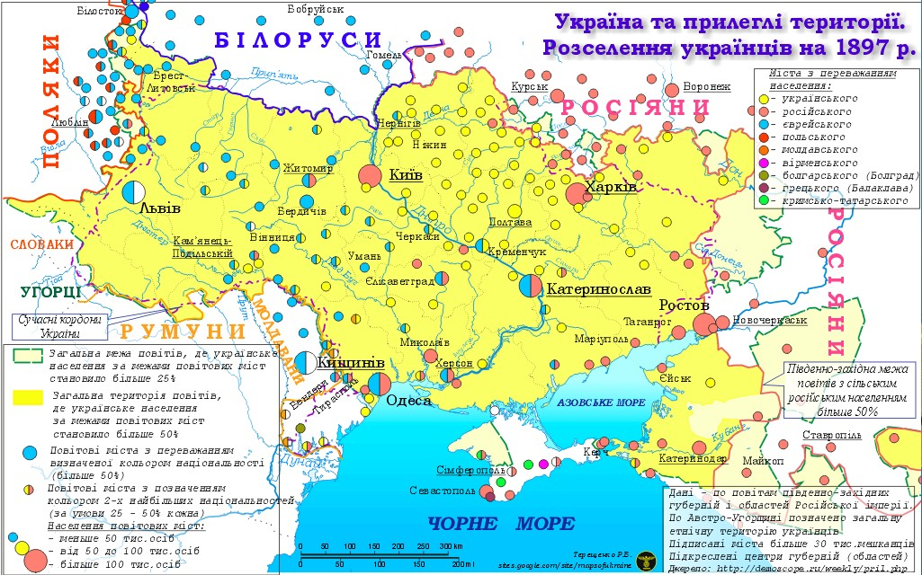 Розселення українців по повітах південно-західних губерній Російської імперії на 1897 р.